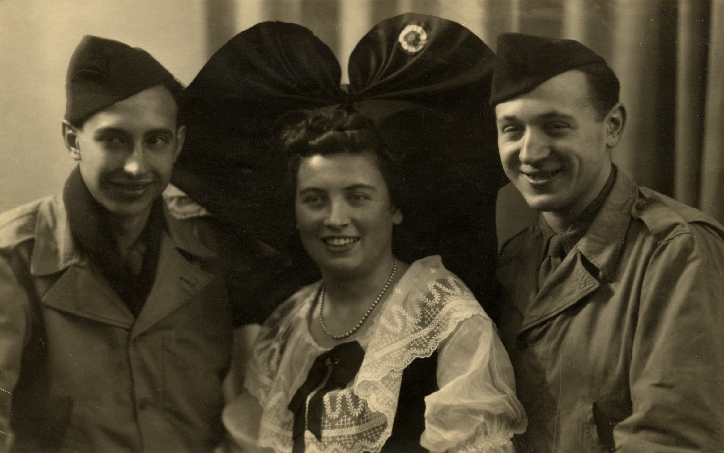 Jeune fille alsacienne en costume traditionnel avec ses filleuls de guerre, 1945